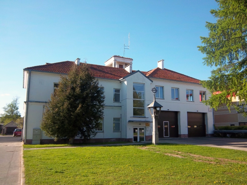 Kaišiadorių gaisrinė